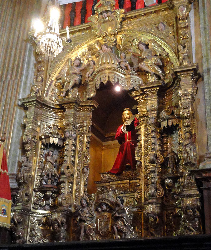 Igreja Matriz de Nossa Senhora do Pilar - Ouro Preto